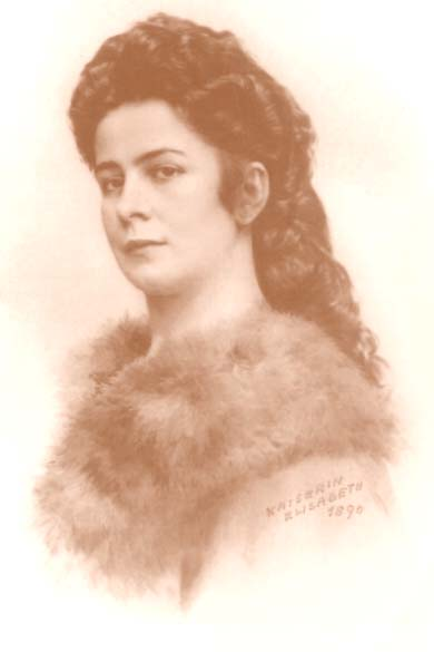 Cesarzowa Elżbieta Fotografia z roku 1890